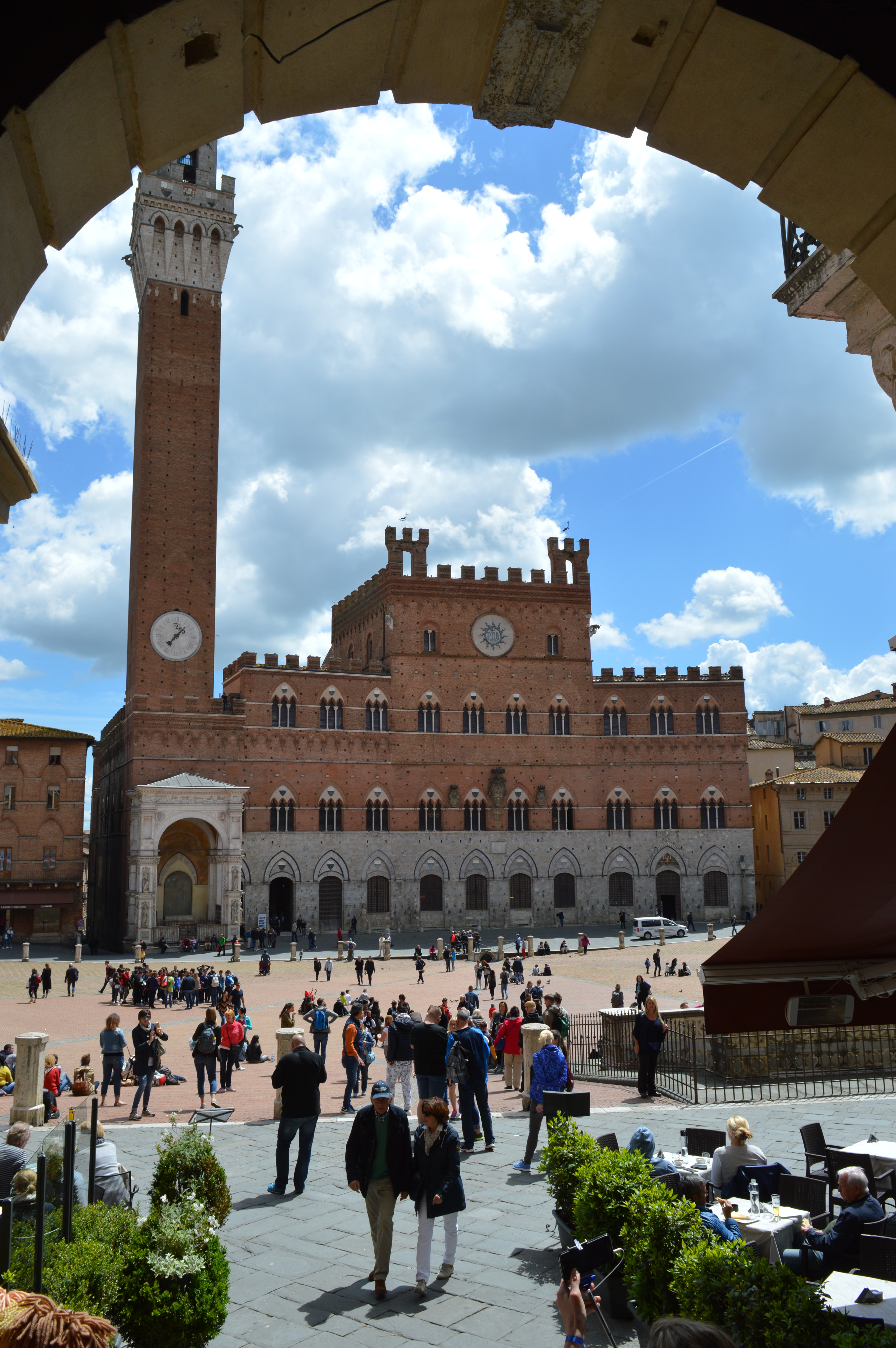 Пьяцца-дель-Кампо, Палаццо Публико и Торре-дель-Манджа, Сиена, Италия